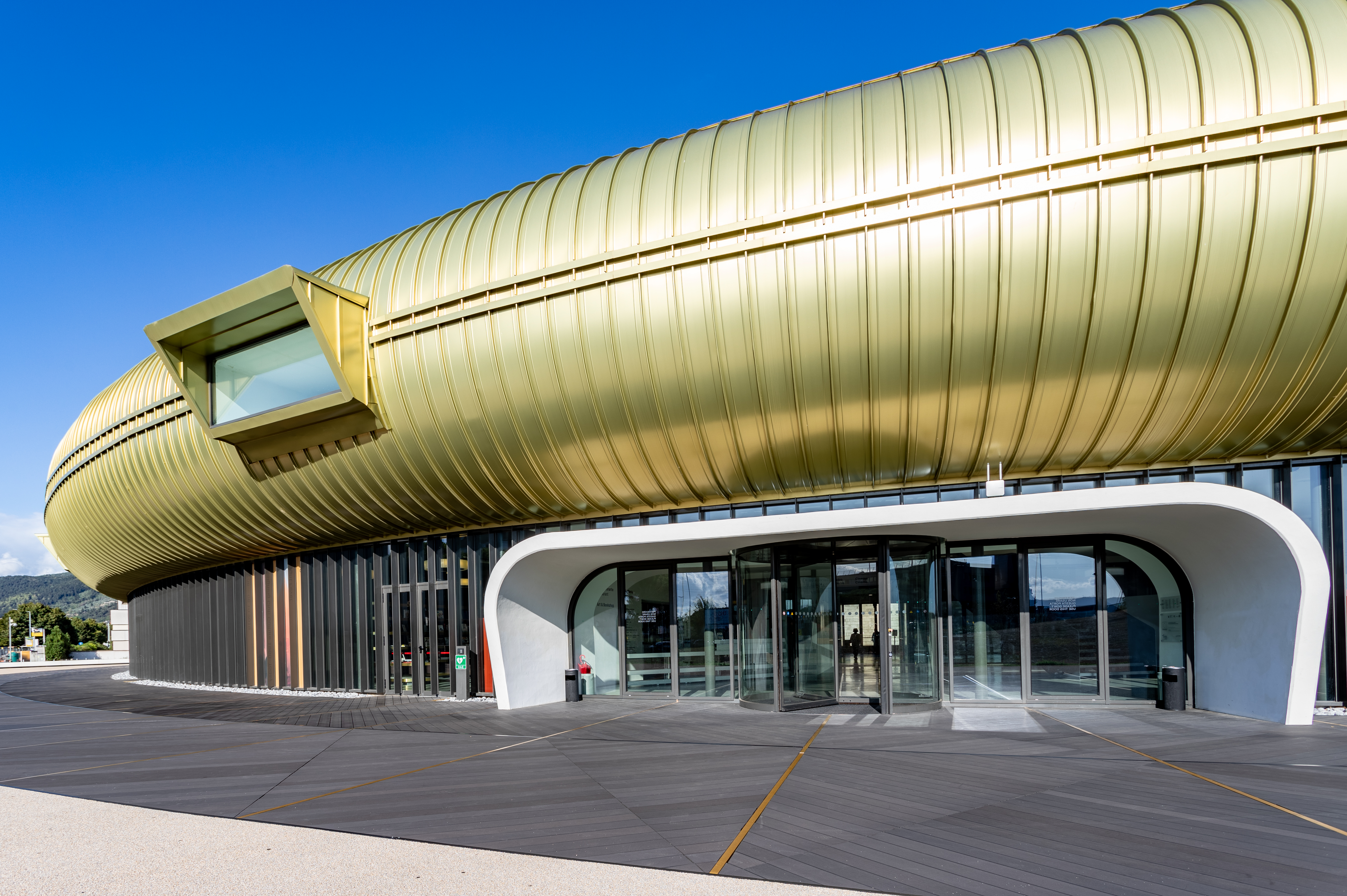 Centro per l'arte contemporanea Luigi Pecci This is a photo of a monument which is part of cultural heritage of Italy.